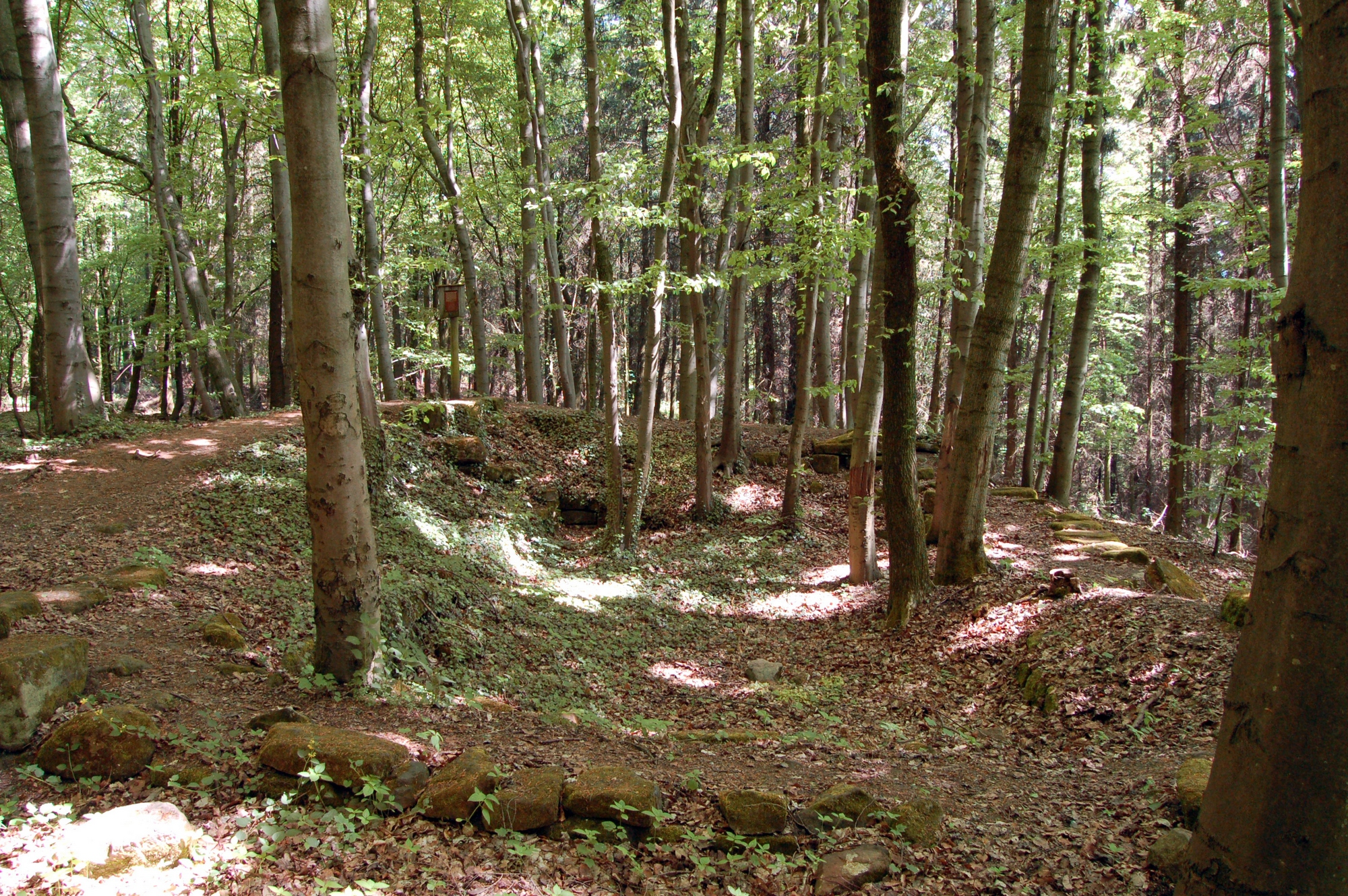 Die Ruine des Stiefeler Schlosses bei St. Ingbert, Saarland.